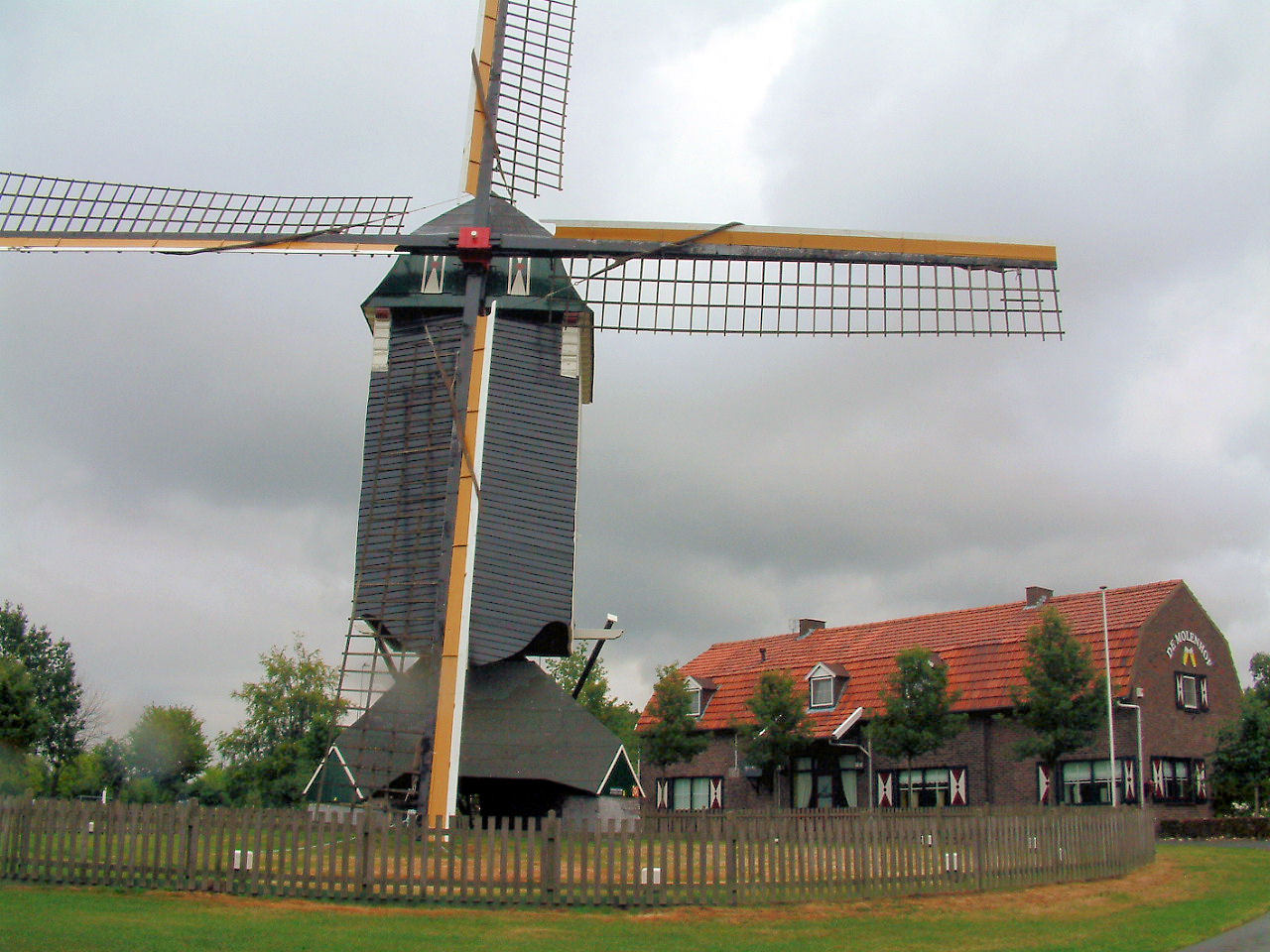 Standerdmolen Urmond